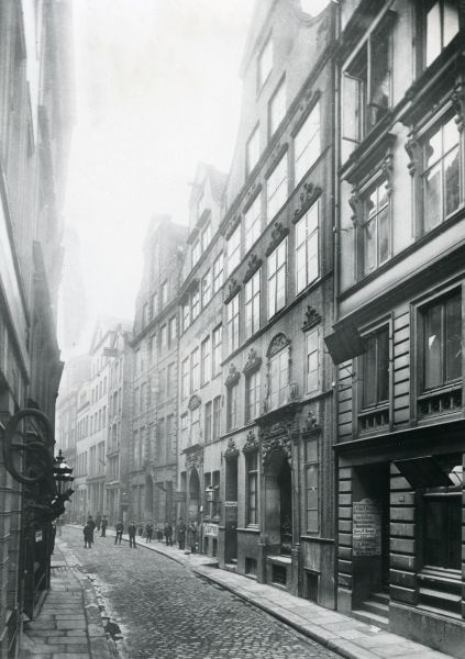 Photographie der Gebäude der Grimm, Hamburg. Das Haus Grimm 31 ist auf der rechten Seite zu sehen (zweites Haus von vorne).